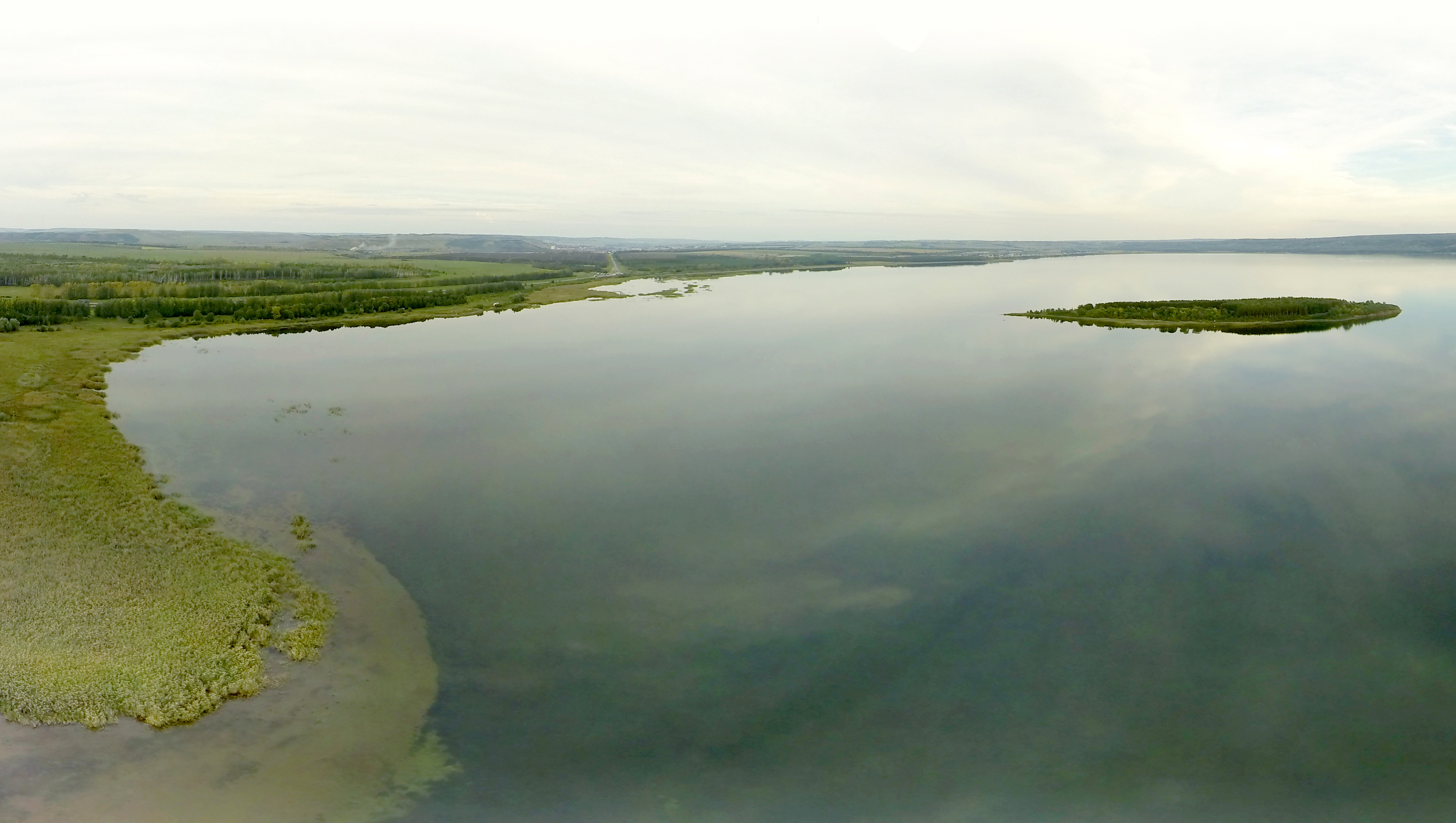 Кандры-Куль, Туймазинский район This image is related to the protected area of Russia number 0210213